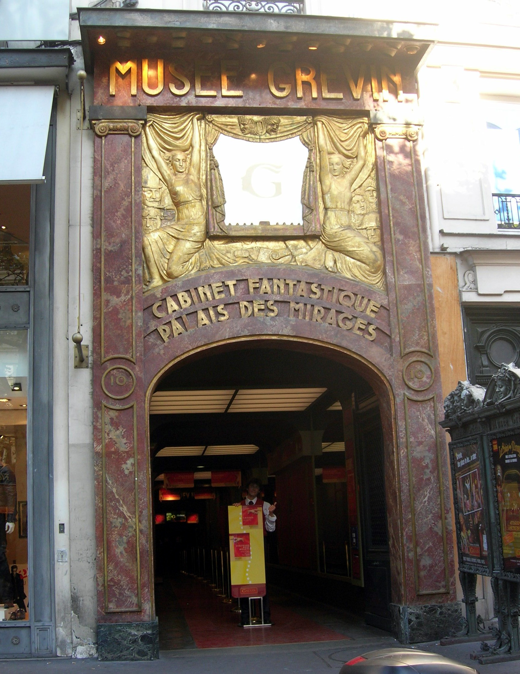 Entrée principale du musée Grévin boulevard Montmartre.